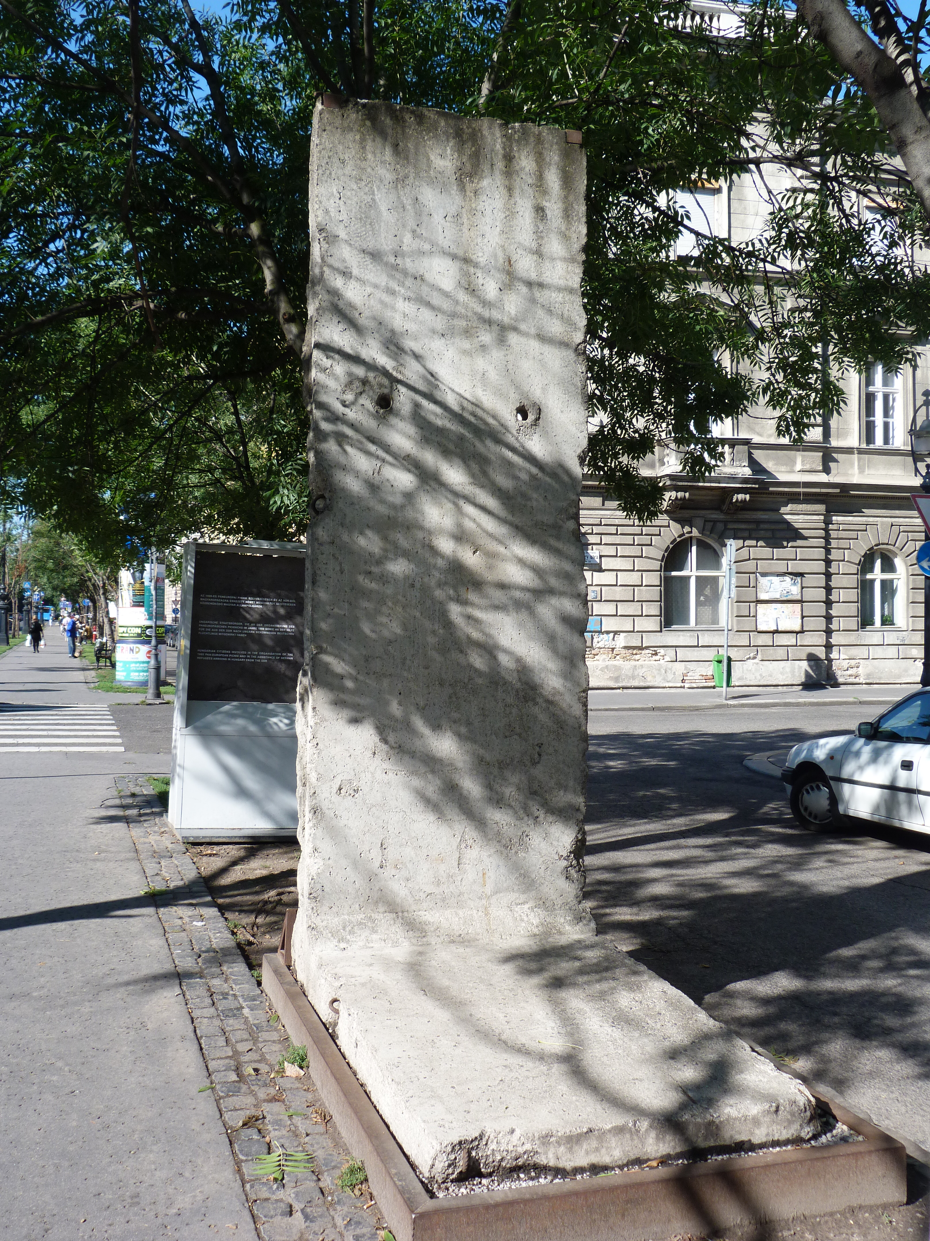 A Berlini fal darabja az Andrássy út 60. szám, a Terror Háza előtt. A felvétel 2014. augusztus 16-án készült, Budapesten. ©© Derzsi Elekes Andor, Budapest 2014, You are authorised to use these photos and vids under Creative Commons – even for commercial, for profit purposes. Photos must be attributed to Derzsi Elekes Andor. All of the photos and vids in the Metapolisz DVD line are under Creative Commons and can be used even for commercial – for profit – purposes. Recommended Citation Derzsi Elekes Andor: Metapolisz DVD line